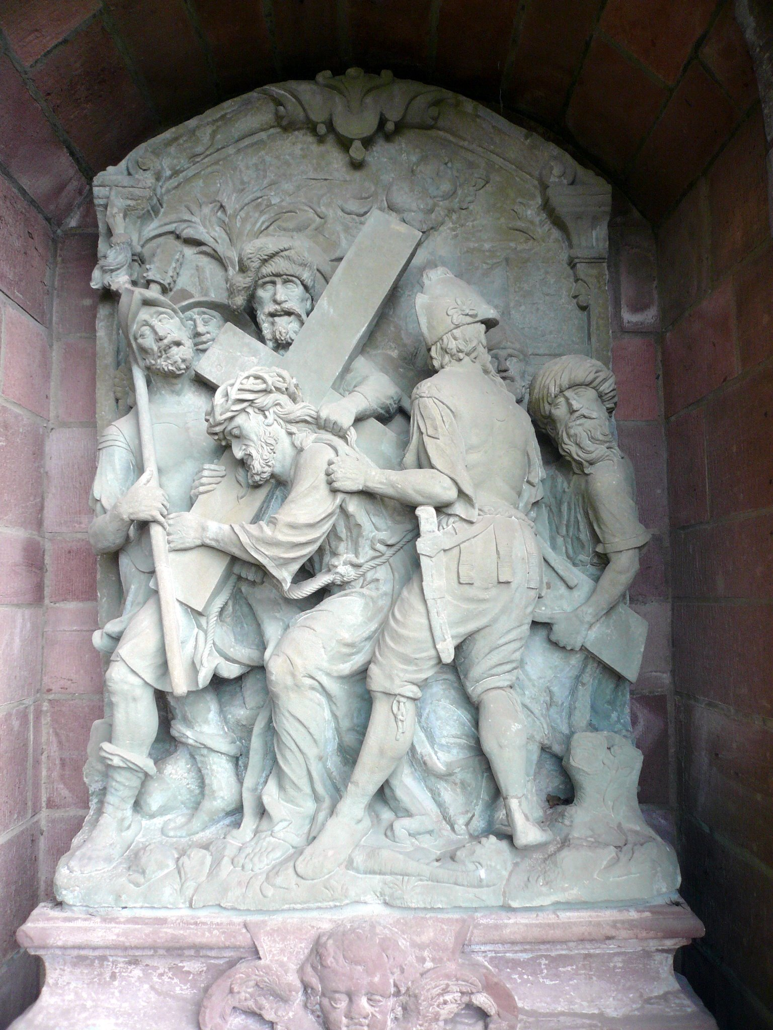 Kapellenkreuzweg Kloster Altstadt, Station 5 - Relief